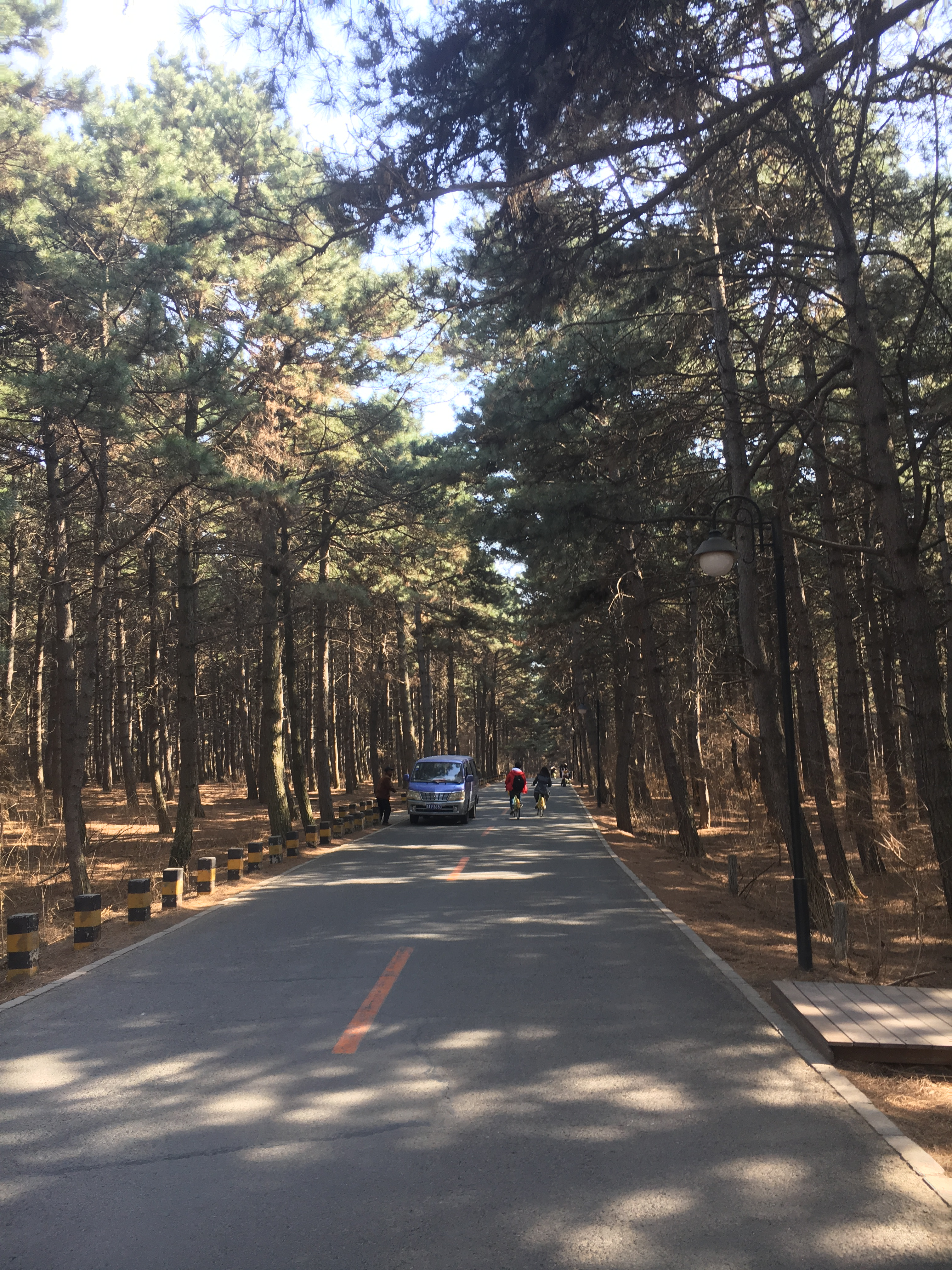 净月潭人工林